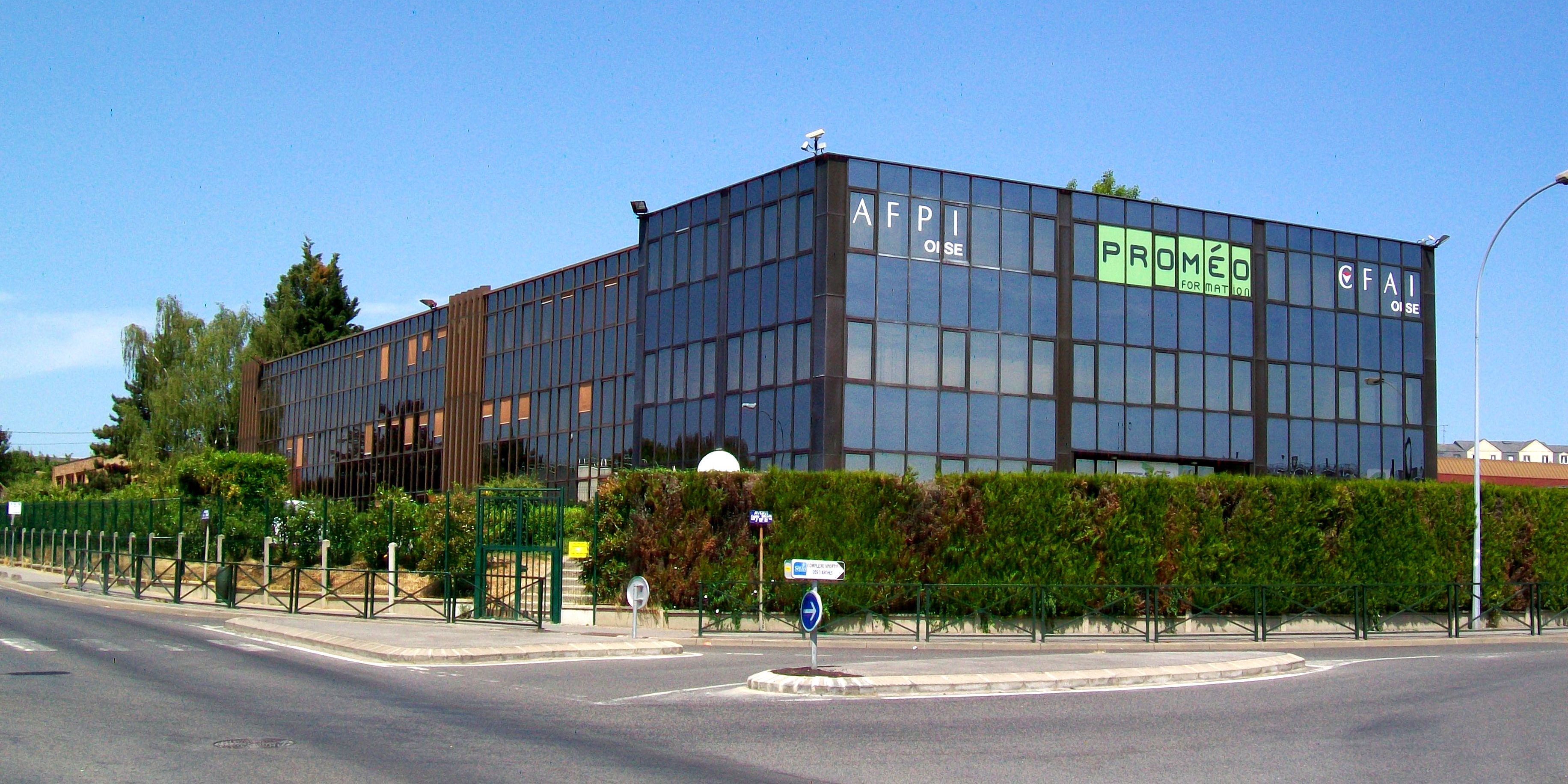 Le centre de formation Proméo, avenue Etienne-Audibert.